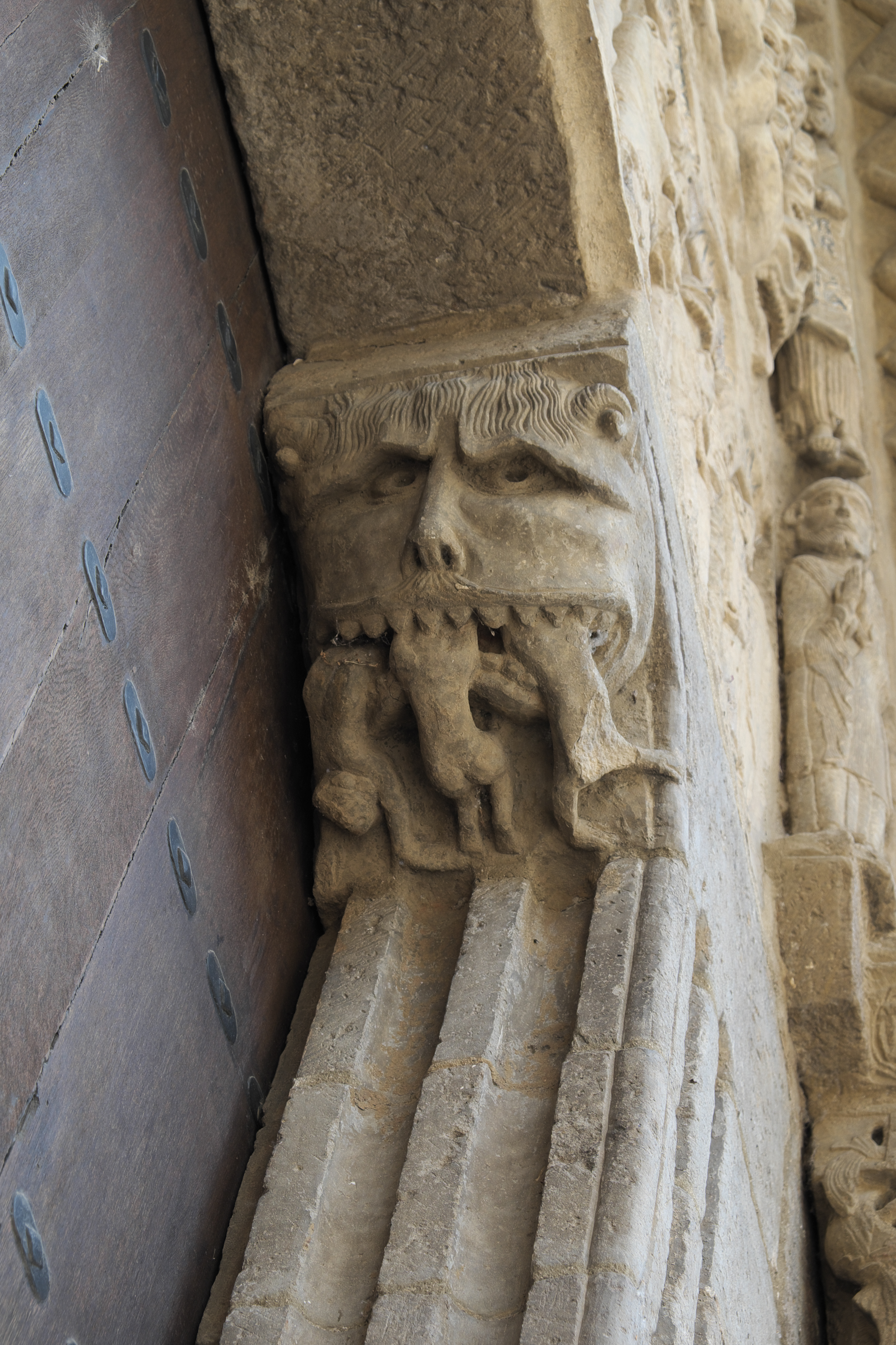 Katholische Pfarrkirche Santa María la Real in Sangüesa in der Region Navarra (Spanien), Konsole (mocheta) am Portal